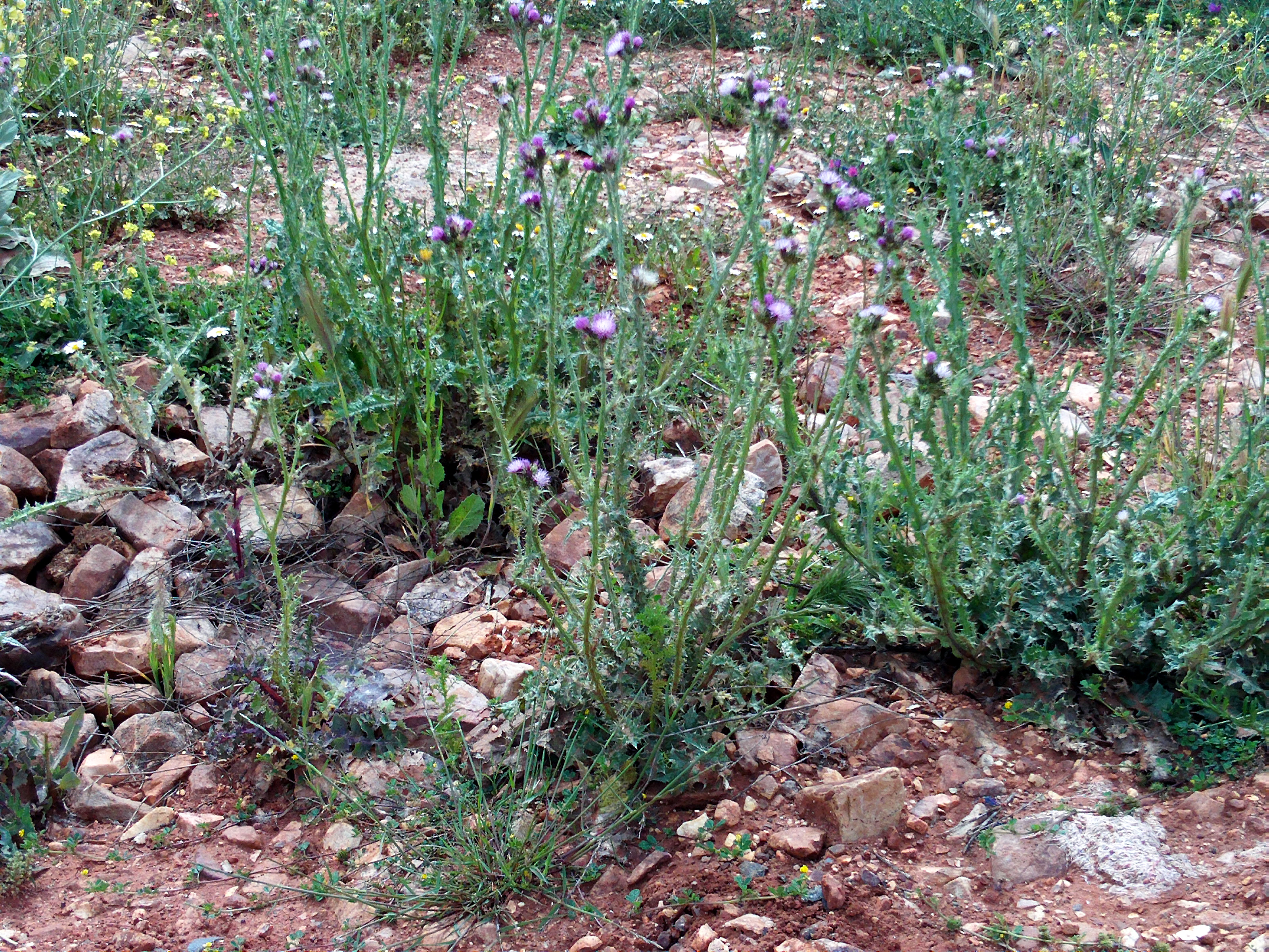 Carduus tenuiflorus habitat Campo de Calatrava, Spain